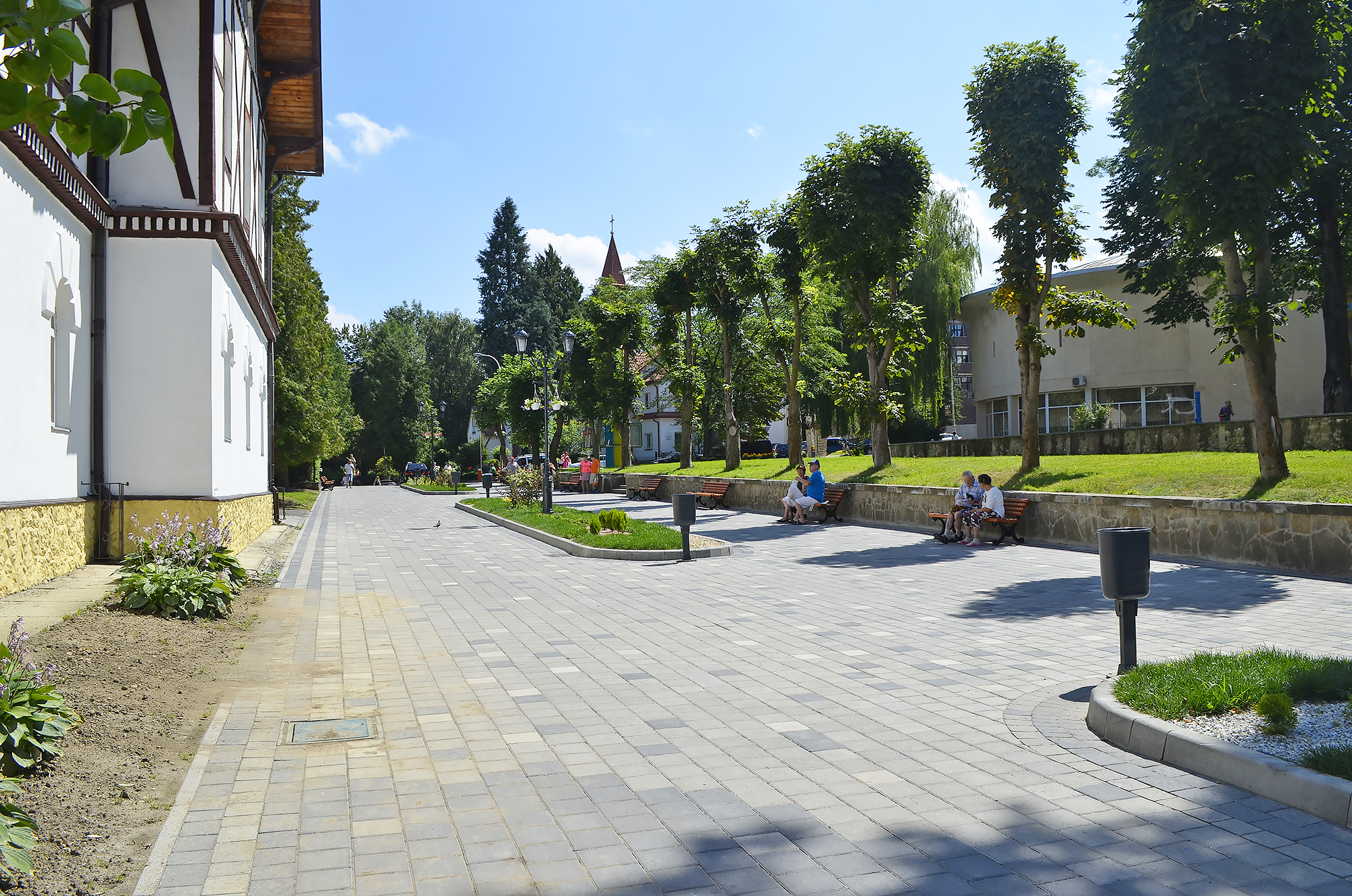 Пешеходная улица "Степана Бандеры" (после реконструкции)